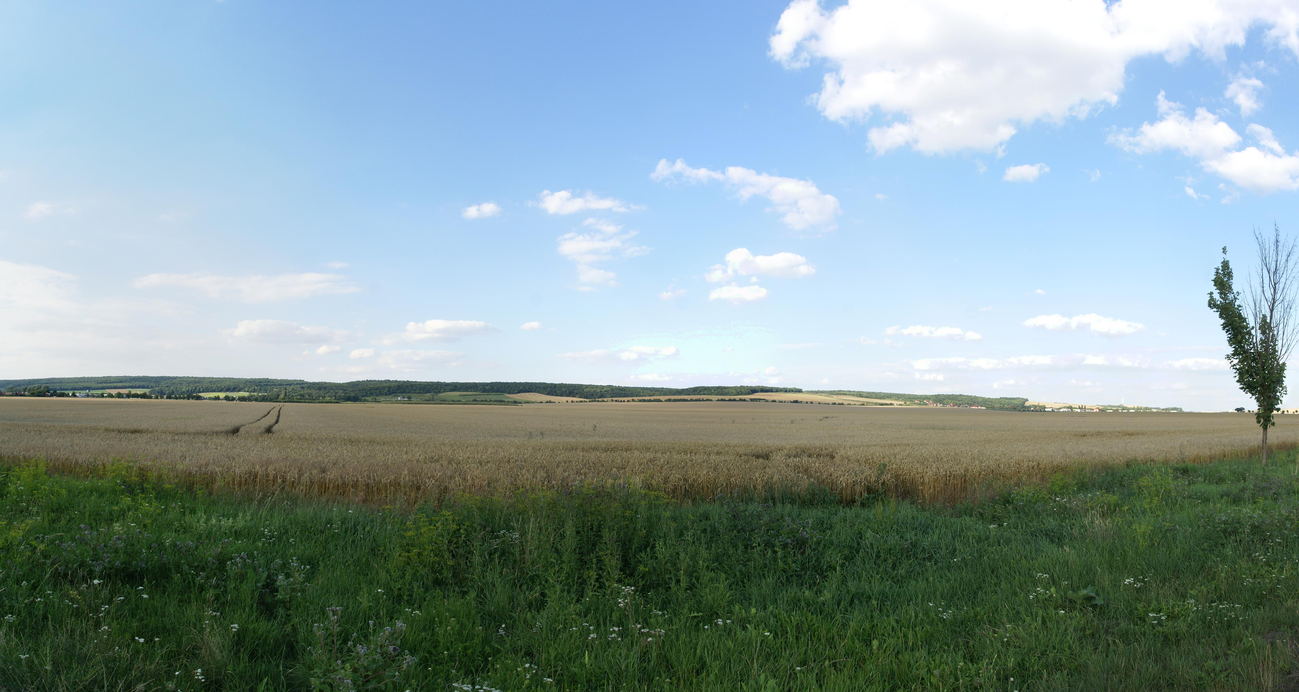 Blick auf den Hornburger Sattel von Kleinosterhausen im Süden